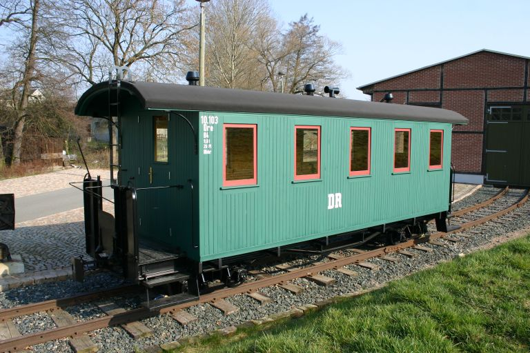 Personenwagen 10.103 der Rollbockbahn